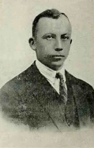 inż. Władysław Świątecki